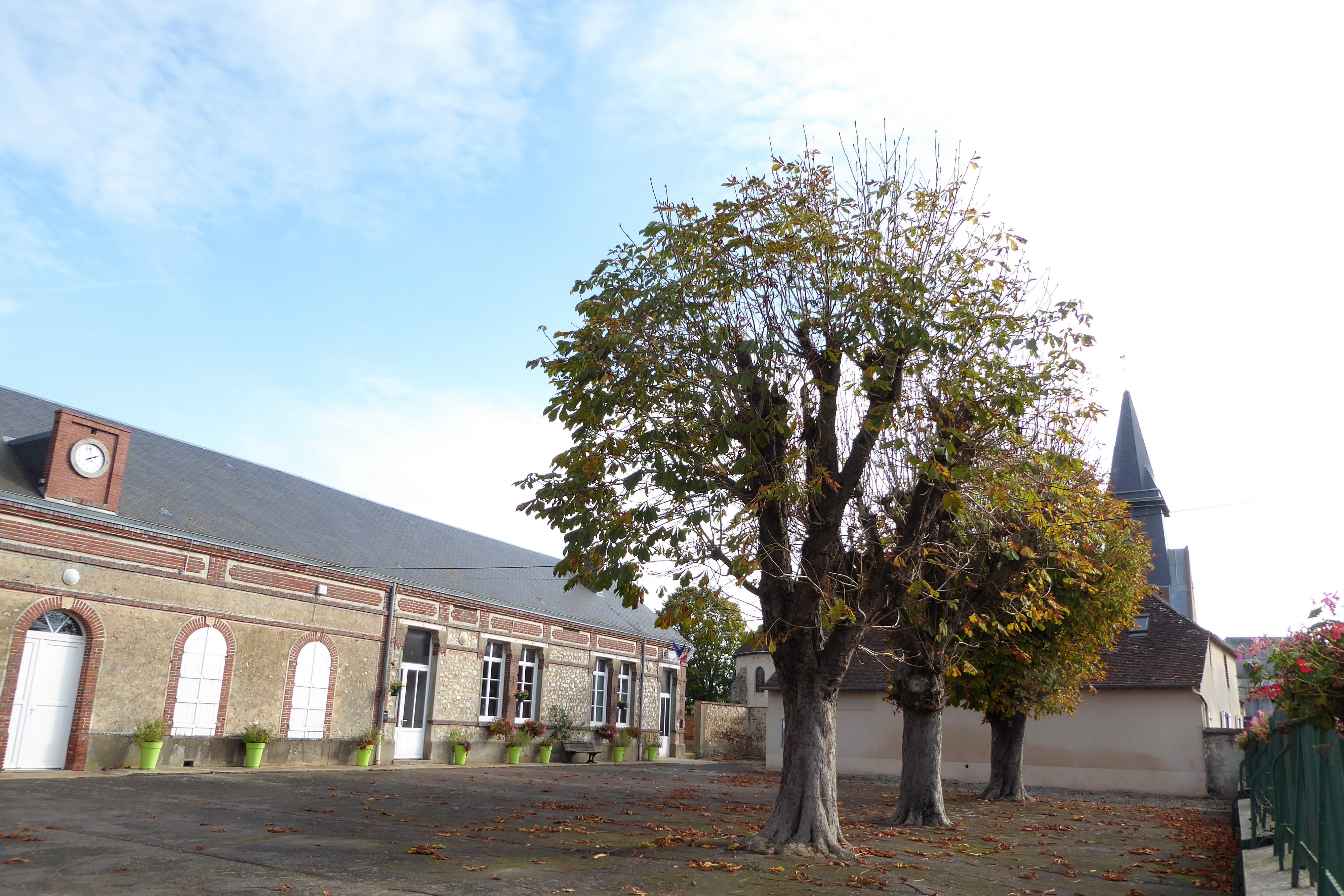 mairie et église Saint-Denis, Serazereux, Eure-et-Loir, France.